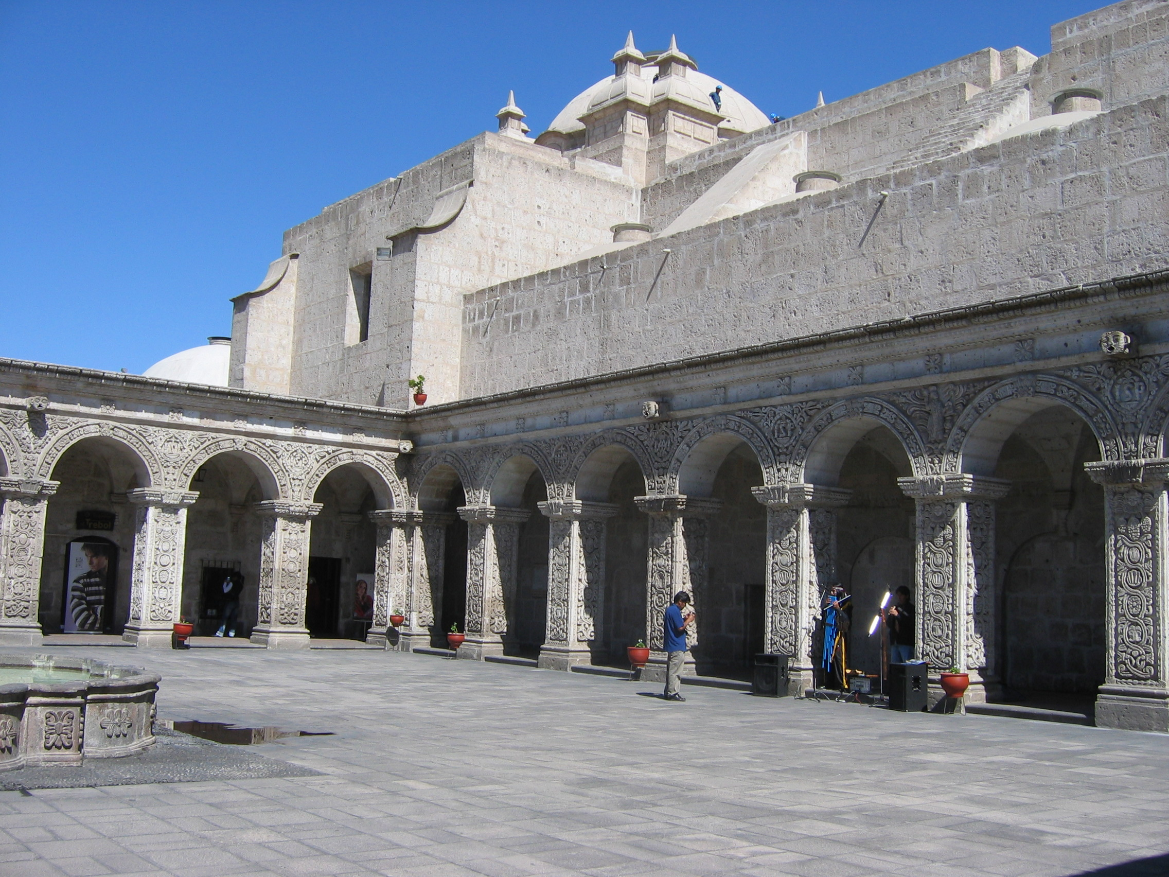 Patio de los Claustros de la Compañía de Jesús, de Arequipa.